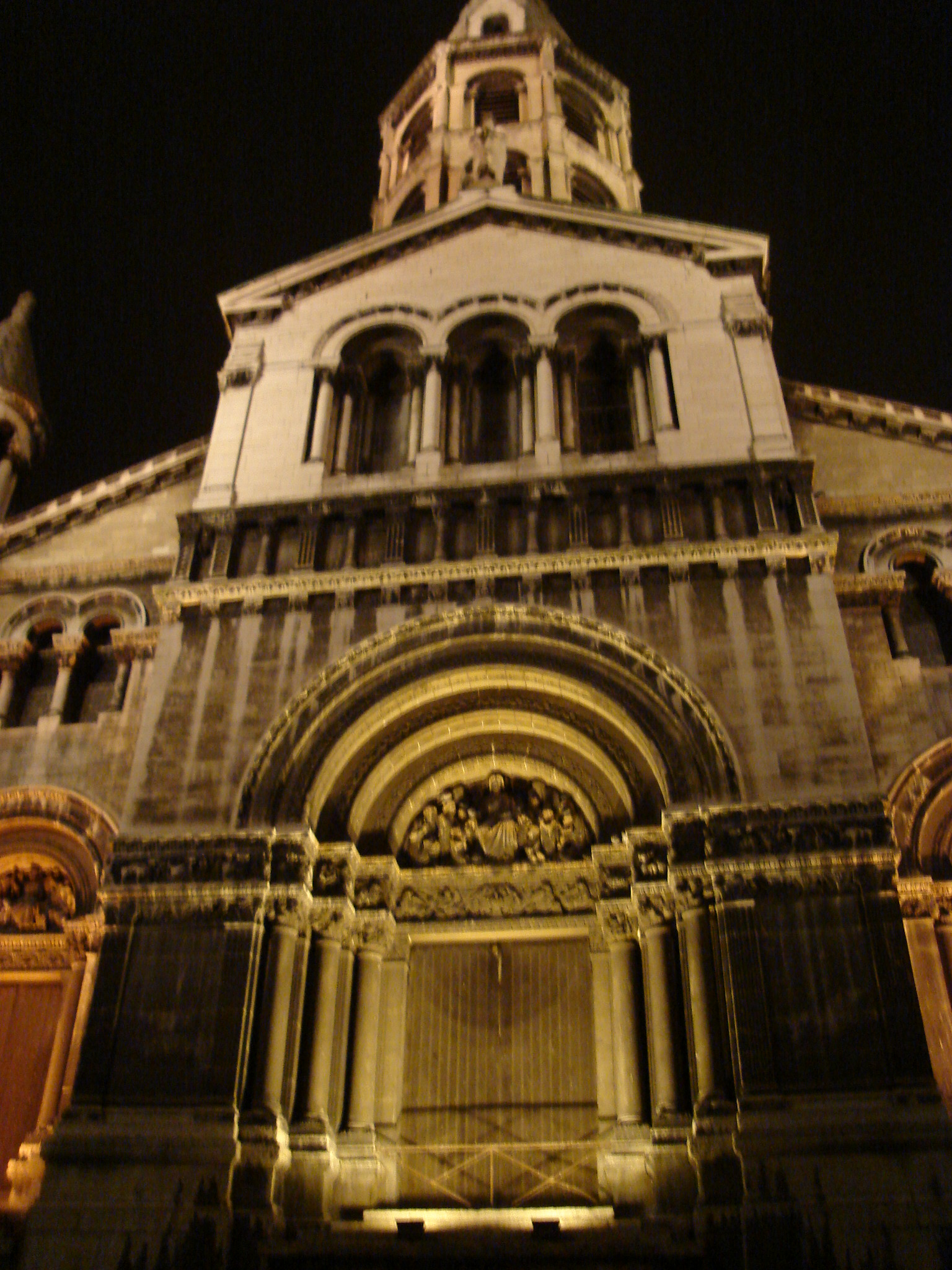 Eglise du Bon-Pasteur, Lyon